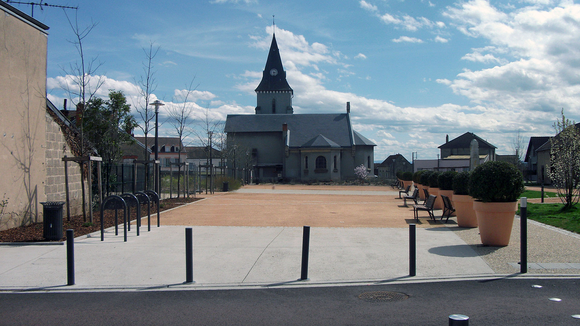 Esplanade Eugène Rouchon, à Saint-Yorre, Auvergne, France, rénovée dans le cadre d'un aménagement de bourg